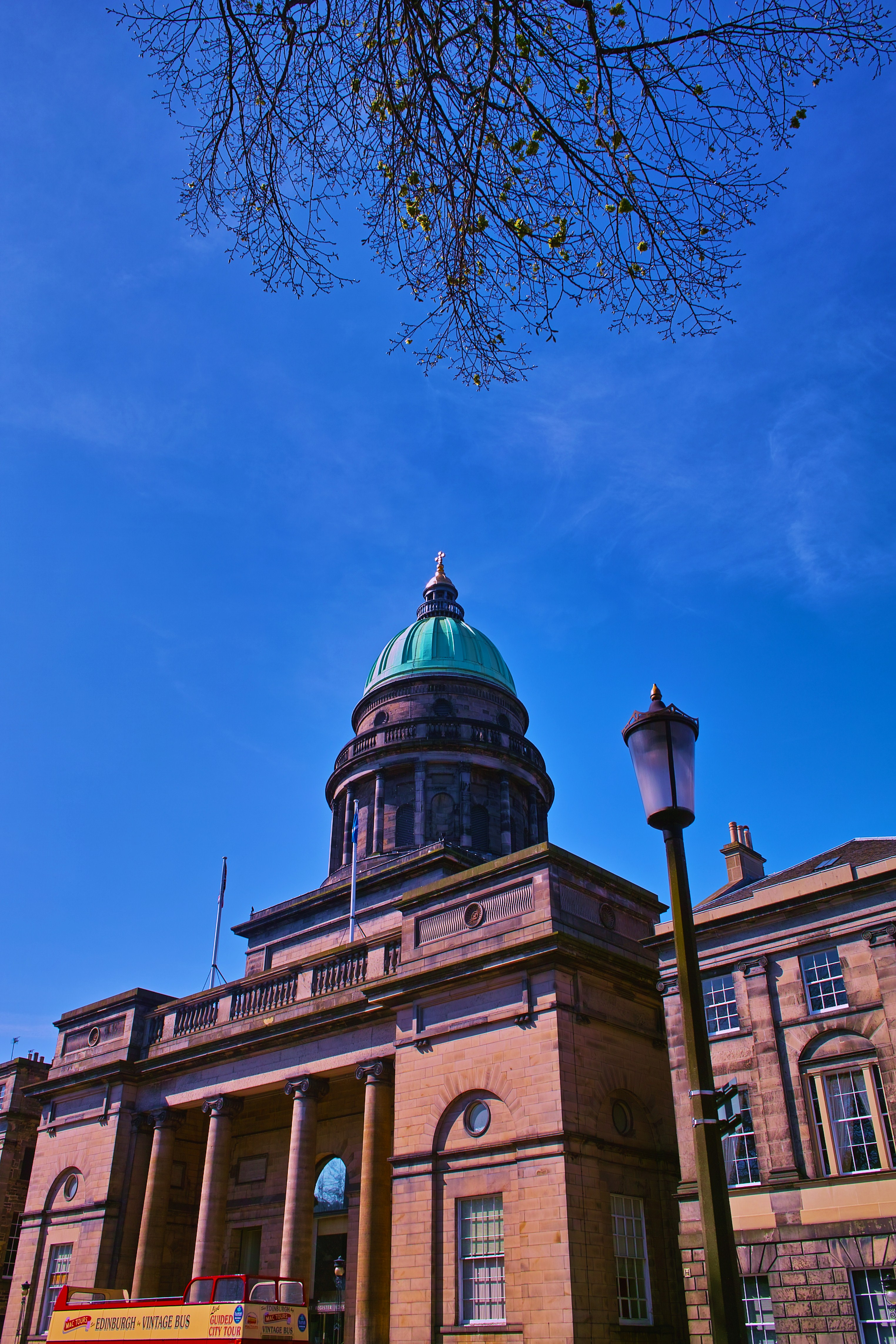 Charlotte Square